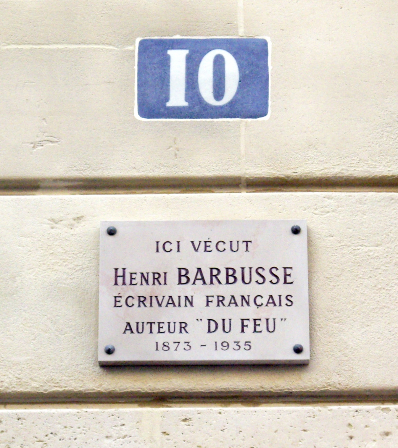 Plaque apposée au n° 10 de la rue Albert-de-Lapparent, Paris 7e, où vécut l'écrivain Henri Barbusse (1873-1935).